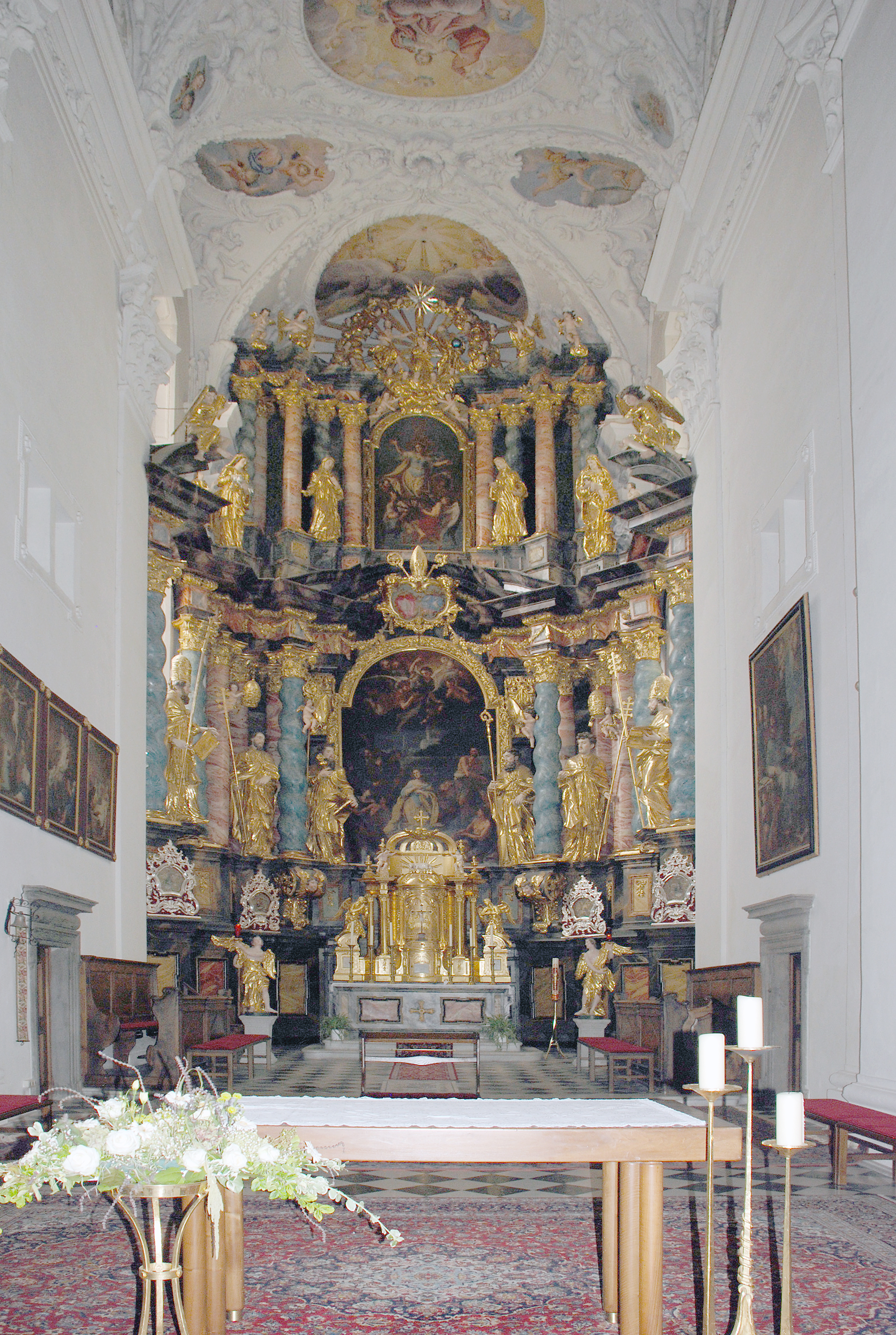 Stainz, Steiermark, Österreich: Pfarrkirche Stainz (ehemalige Klosterkirche der Augustiner-Chorherren), Hochaltar Object location46° 53′ 47.3″ N, 15° 15′ 48.83″ E